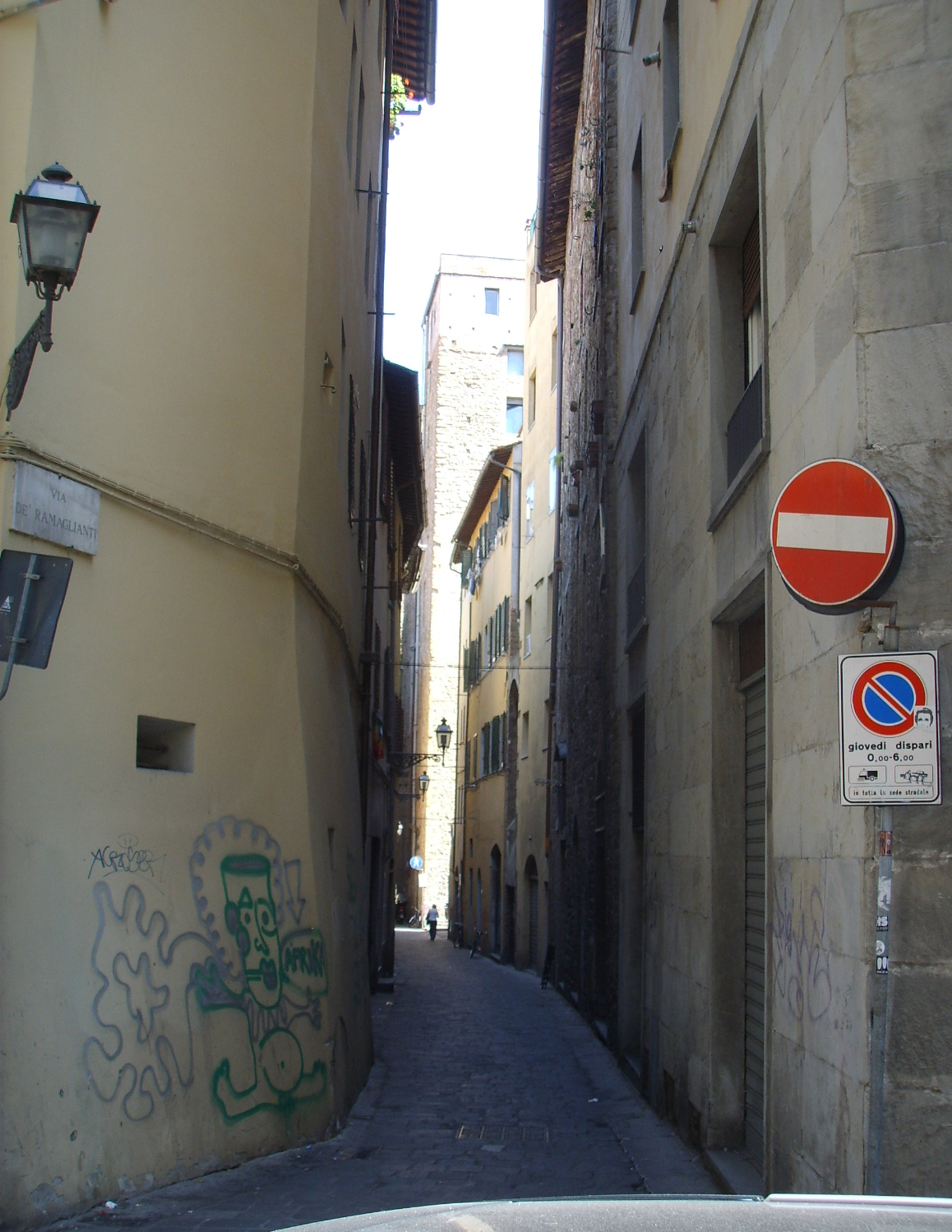 Via de' ramaglianti